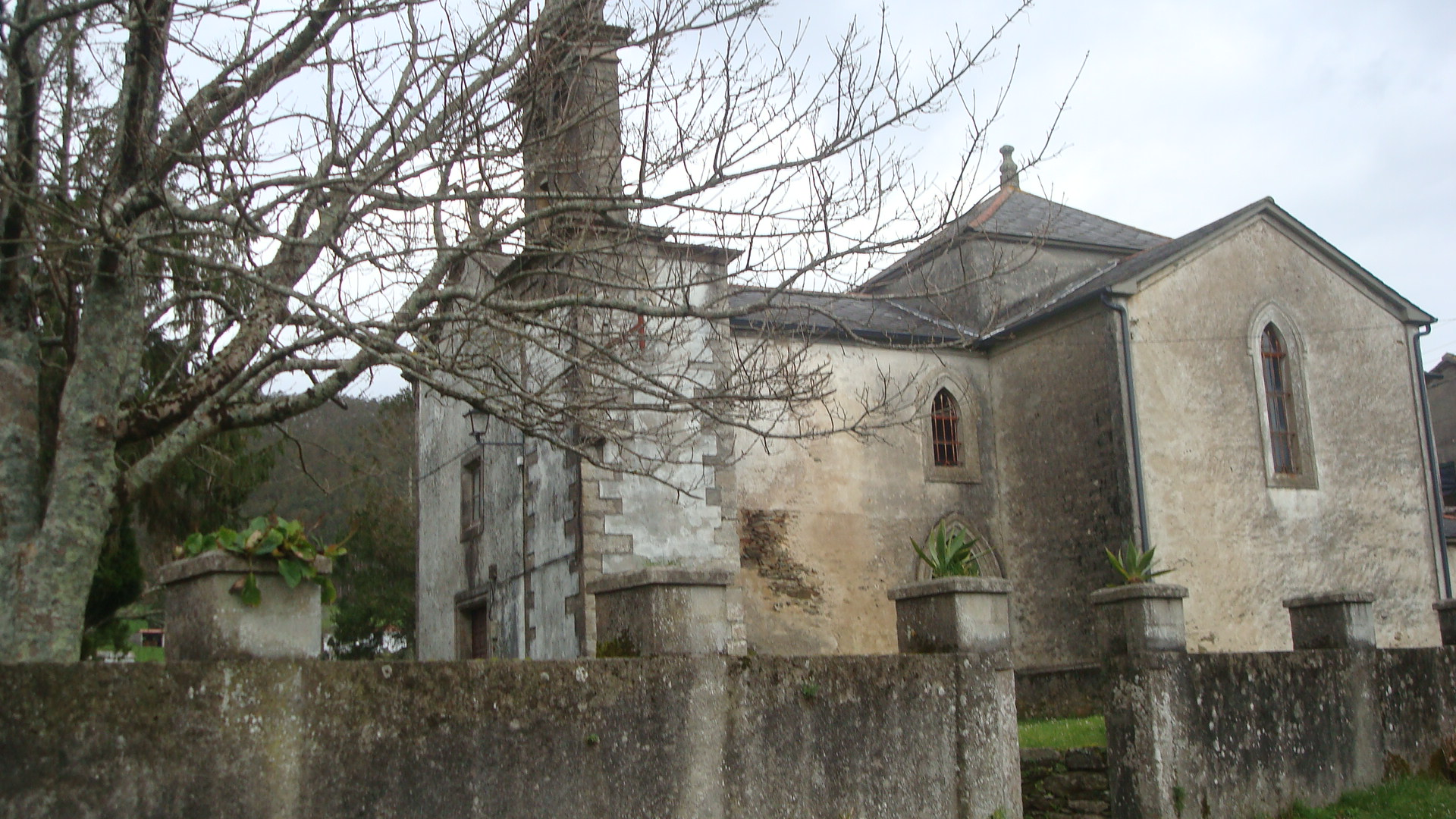 A igrexa de estilo barroco de Santa Cruz